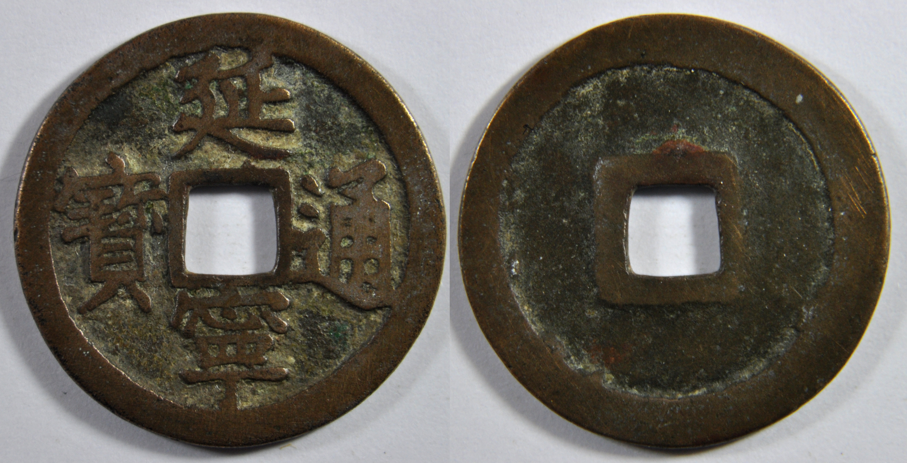 Une monnaie en cuivre d'une sapèque de l'empereur Le Nhan Tong (1442-1459), ère Dien Ninh (1454-1459) de la dynastie des Le postérieurs (Nha Hau Le) qui a dirigé le Vietnam de 1428 à 1788. A l'époque, le pays s'appelait le Dai Viet. A/ Dien Ninh thong bao (Monnaie courante de l'ère Dien Ninh) R/ vide Dimension : 24,64 mm Poids : 3,8 g. Remarques : Cette monnaie a une belle calligraphie. Le caractère Ninh (en bas) est écrit de manière particulière : le trait horizontal du "T" aurait du être attaché au rectangle du dessus. C'est le troisième roi de cette dynastie. Il est le fils cadet de Le Thai Tong. Il devient roi alors qu'il est encore un enfant (Il a un an seulement !) et c'est Trinh Kha qui gouverne. La mère du roi, Nguyen Thi Anh, d'origine noble, le fait exécuter avec son fils en 1451. En 1453, Le Nhan Tong prend officiellement le pouvoir à 12 ans mais c'est sa mère qui gouverne. En 1459, son frère ainé, Le Nghi Dan, organise un coup d'état et le roi est tué alors qu'il n'a que 18 ans et sa mère le lendemain par un serviteur pour éviter l'exécution par hommes de Le Nghi Dan. Références : 428 BNF (Catalogue des monnaies vietnamiennes, François Thierry, 1988), Mitchiner NIS 4475 Indice de rareté : C (Commune)